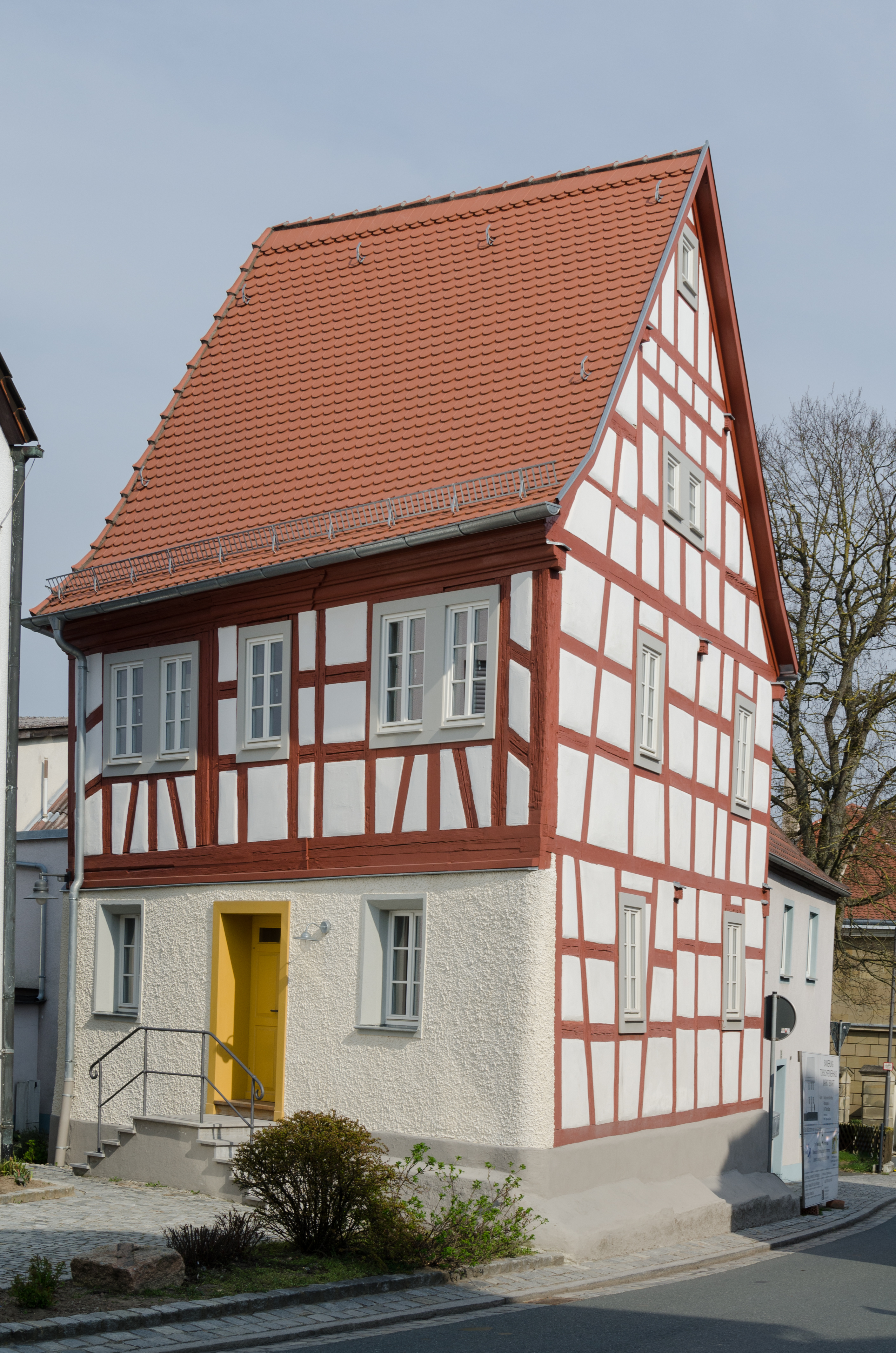 Markt Bibart, Nürnberger Straße 37